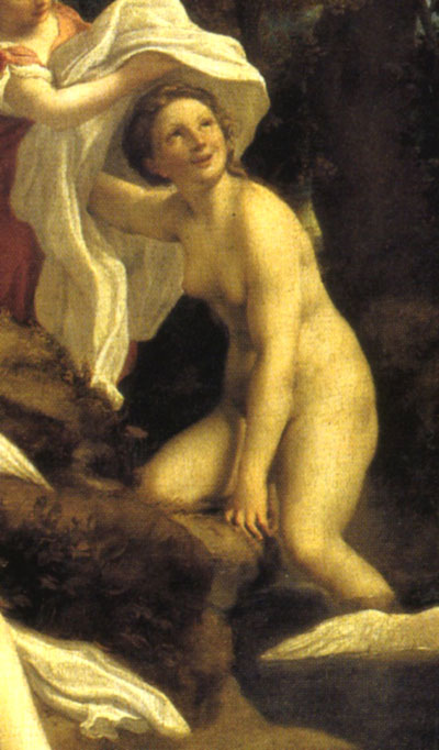 Correggio, leda, dettaglio